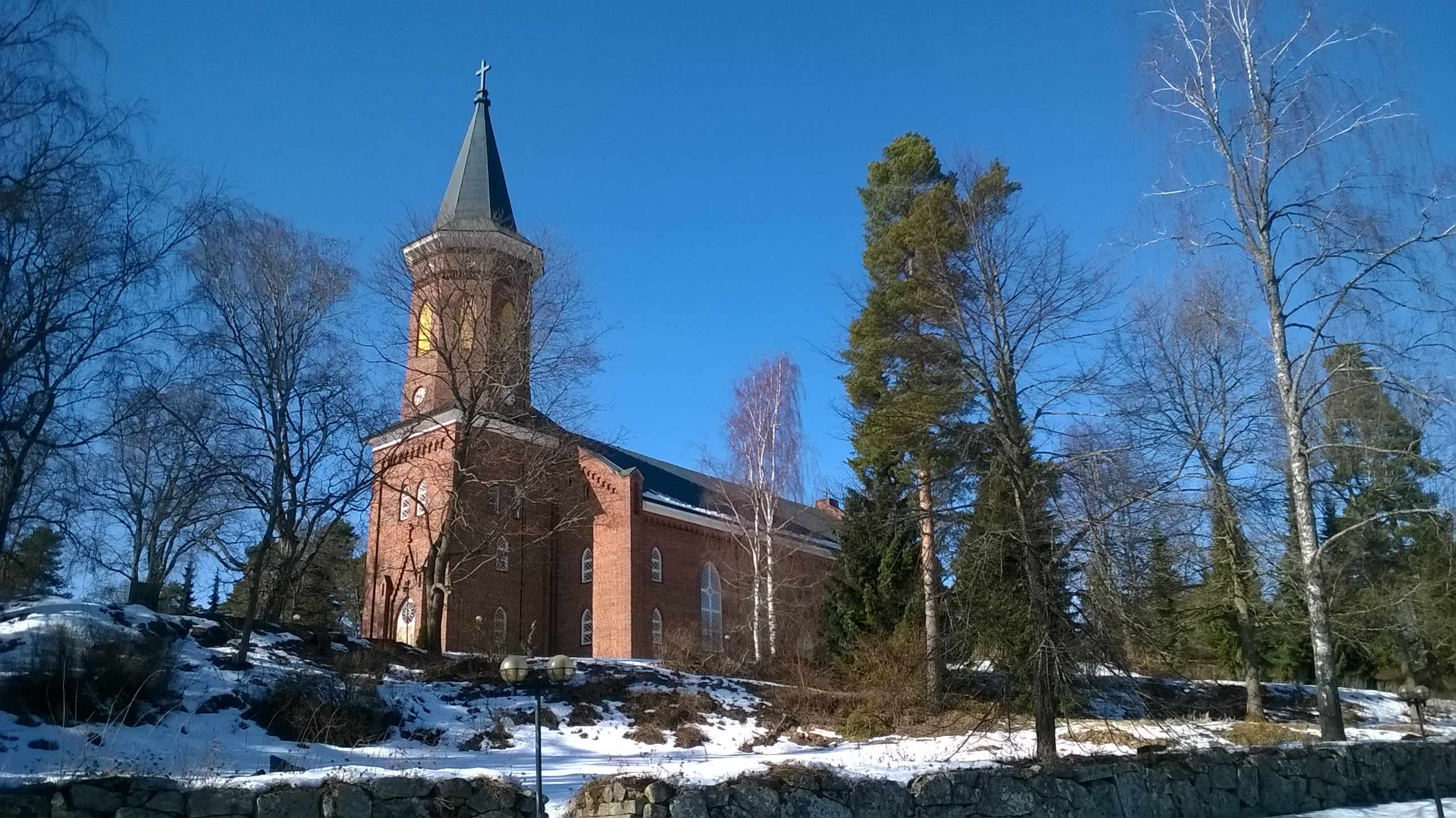 Hattulan uusi kirkko